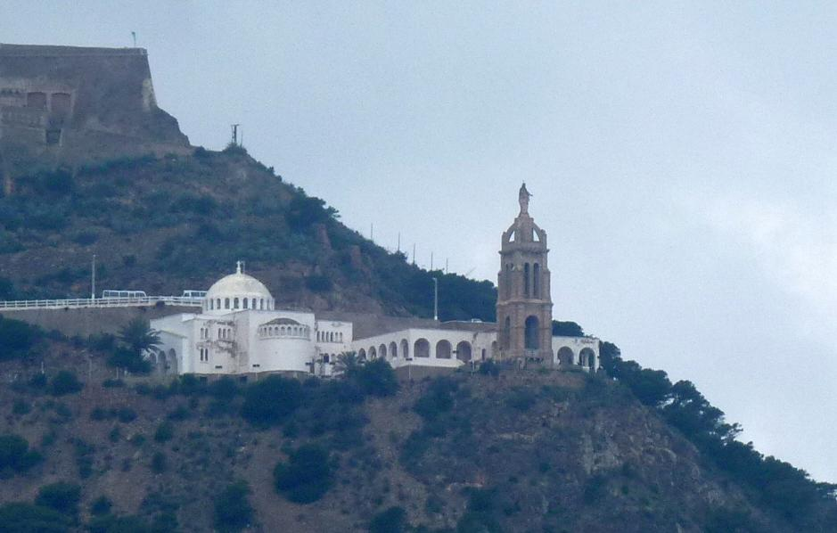 Oran, Algérie. Chapelle Notre-Dame du Salut sur la colline de Santa-Cruz.